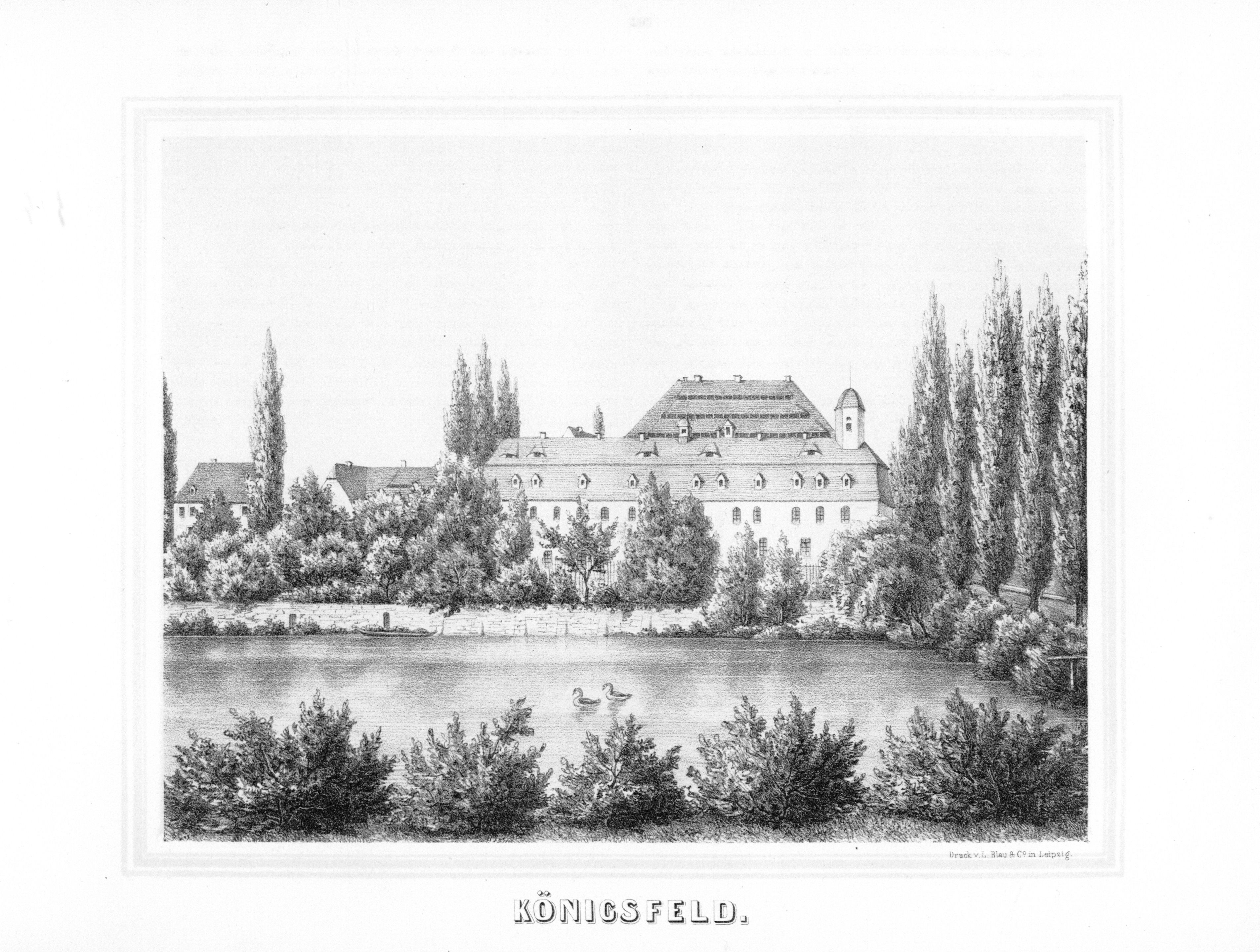 Königsfeld aus: Album der Rittergüter und Schlösser im Königreiche Sachsen Leipziger Kreis Section: I